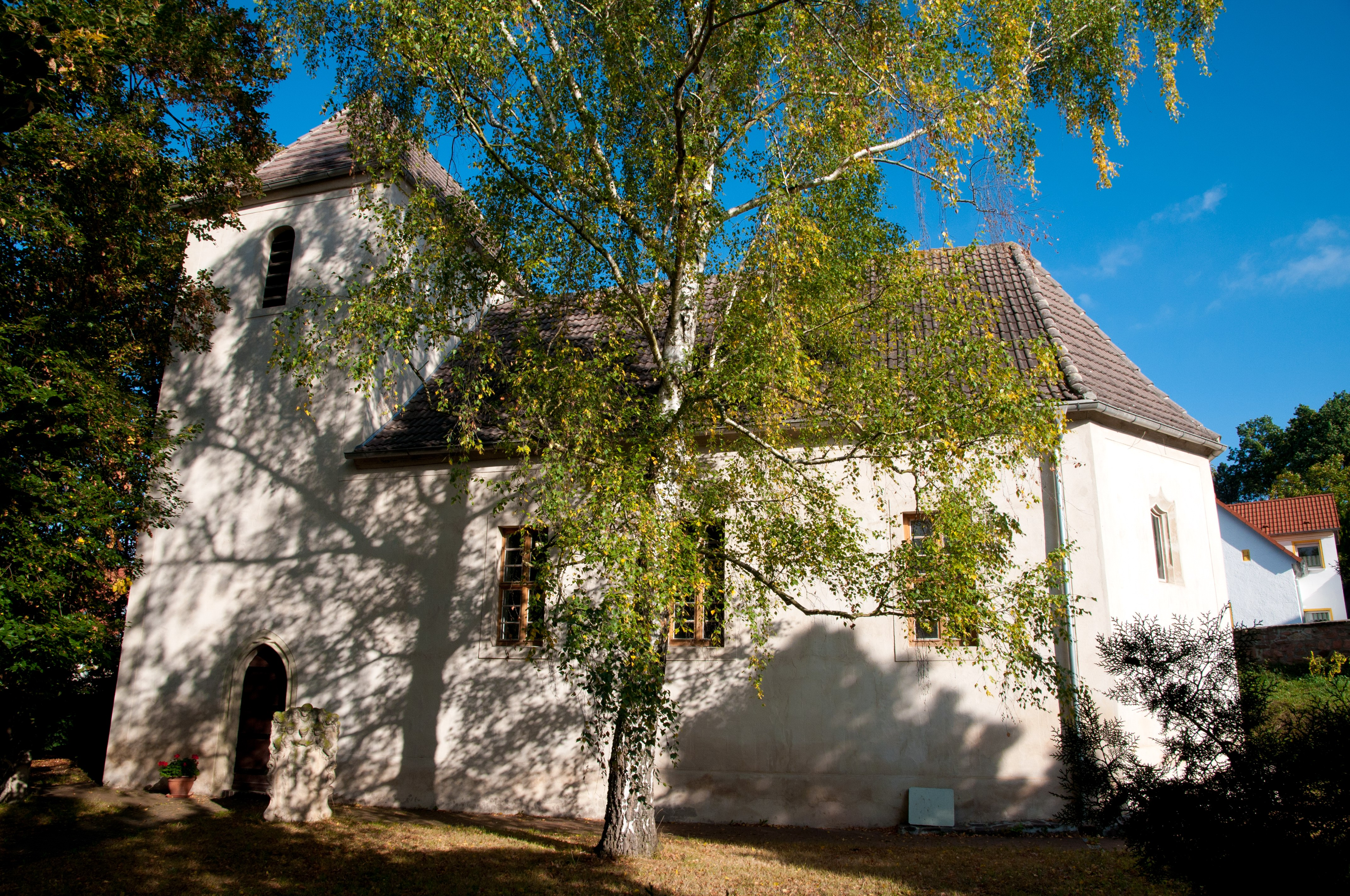 Kirche St. Michael Brachwitz (Sachsen Anhalt, Deutschland)